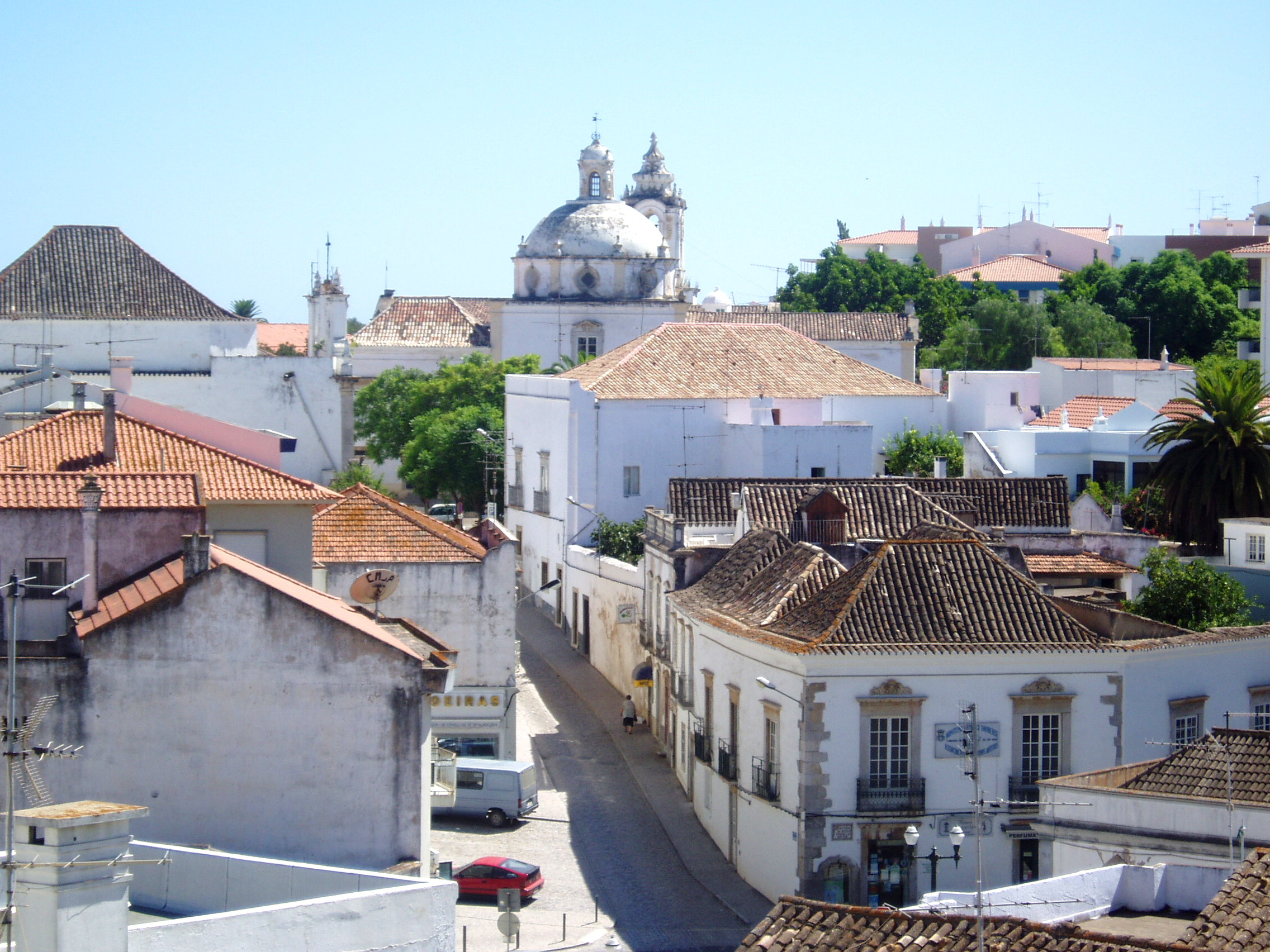 Imagen de Tavira, Algarve portugués.